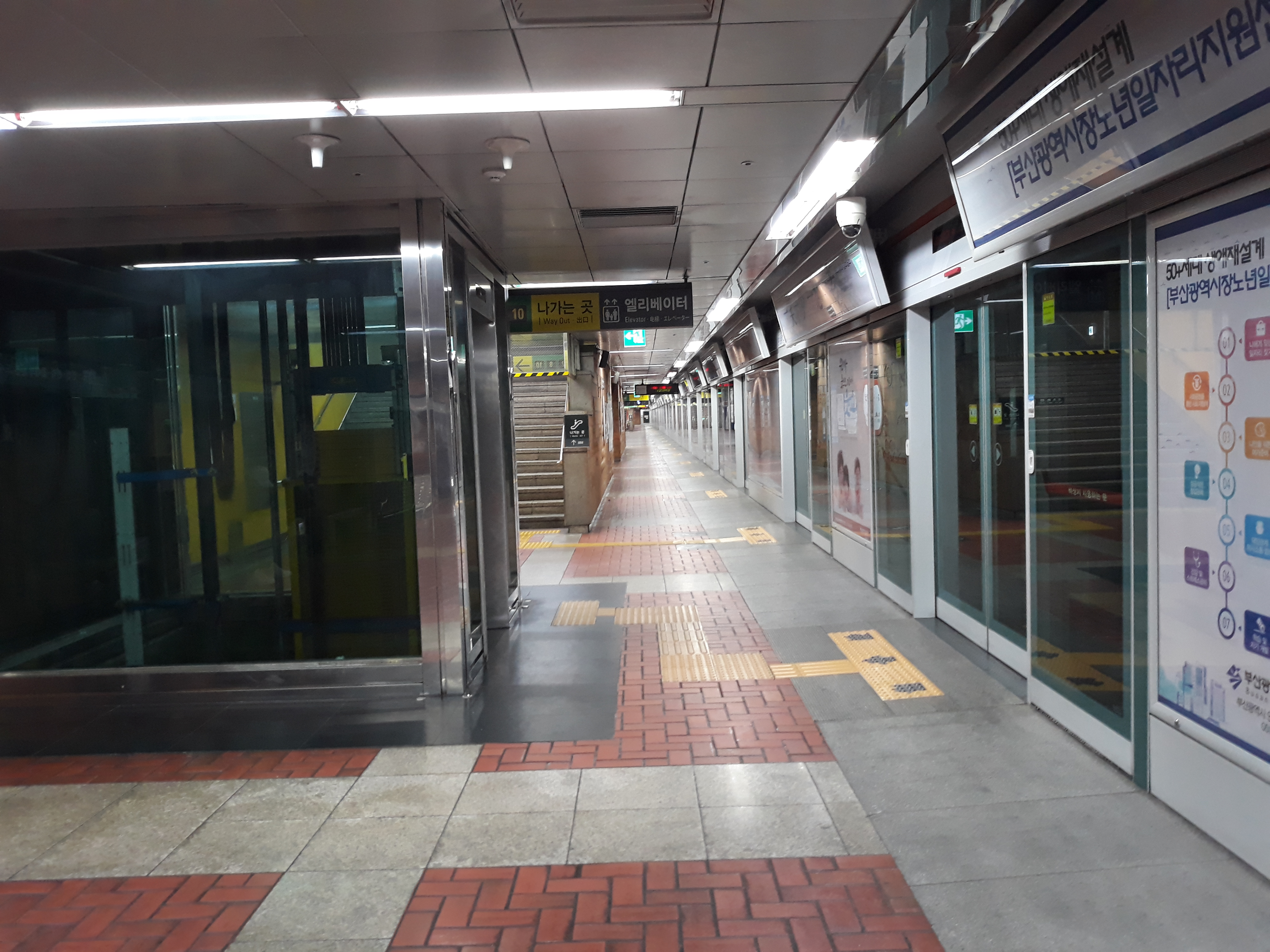 부산 도시철도 1호선 자갈치역 노포 방면 승강장